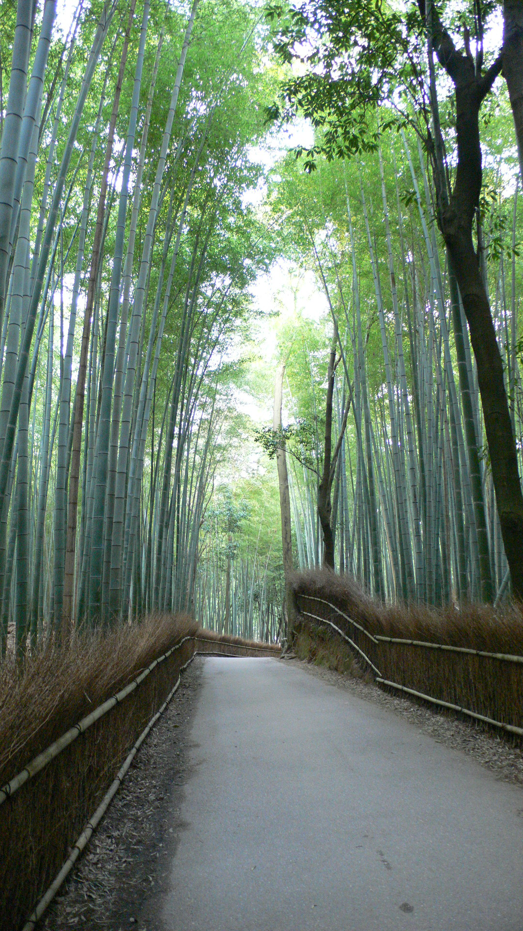 Bamboo_Forest in Sagano, Kyoto, Japan